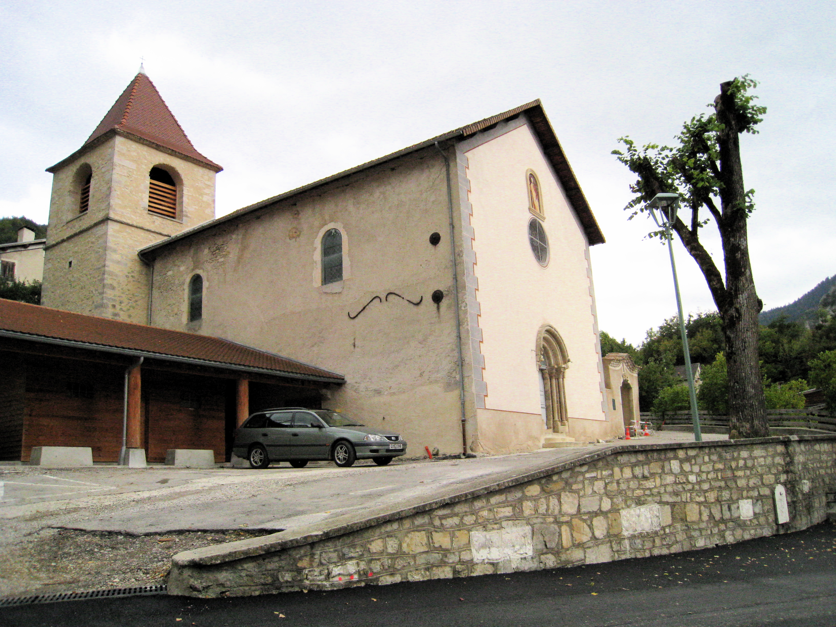 Eglise de Glandage, Drôme, France